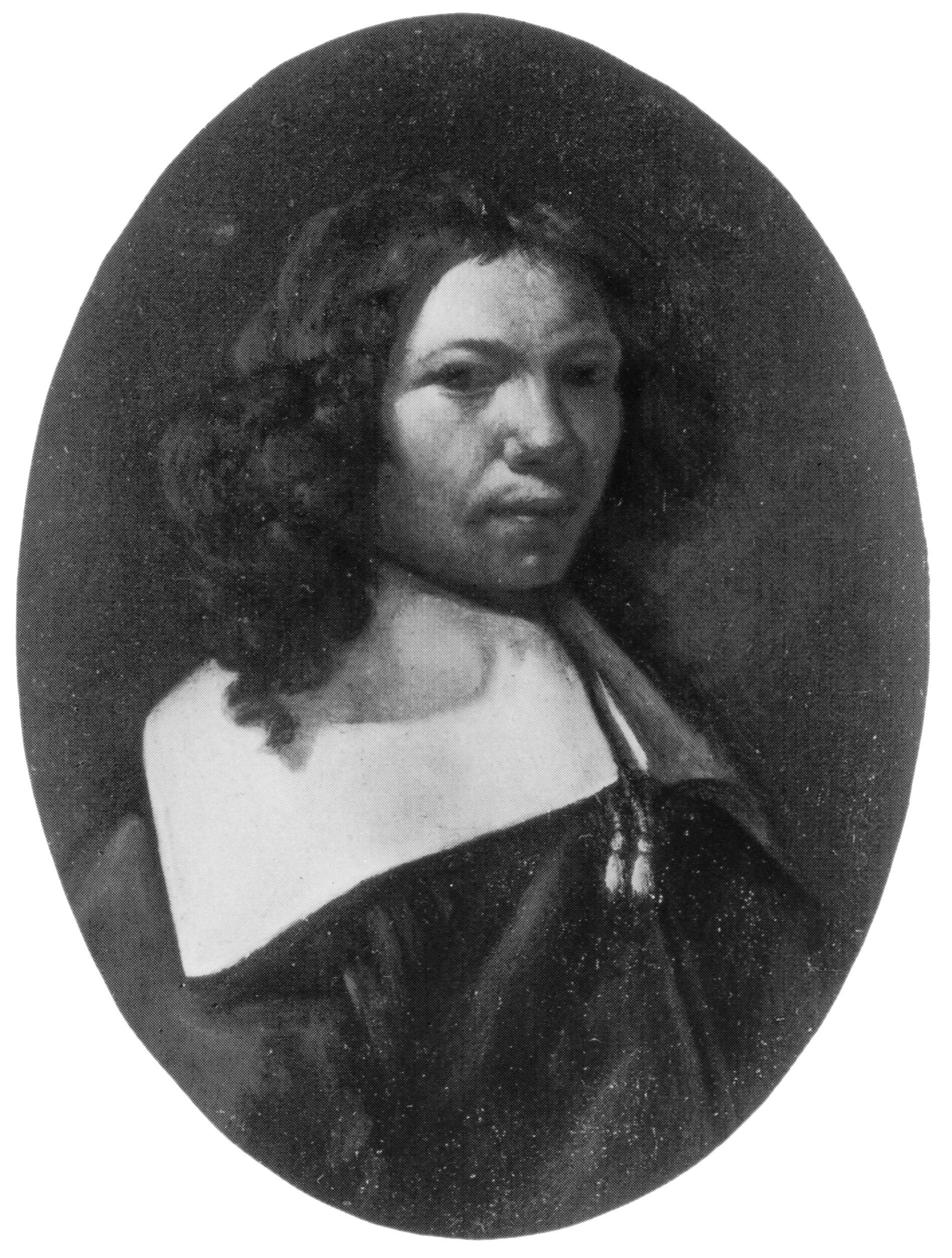 Portret van Gerrit Berckheyde. 1650-1674. oil on coppermedium QS:P186,Q296955;P186,Q753,P518,Q861259. Height: 11 cm (4.3″); Width: 8 cm (3.1″) dimensions QS:P2048,11U174728;P2049,8U174728. Haarlem, Frans Hals Museum.